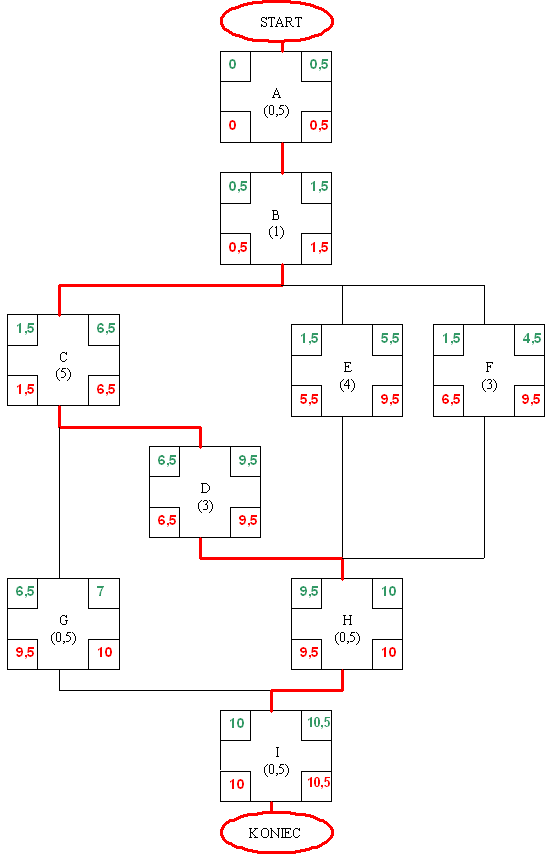 Schemat_projektu_dla_wyznaczenia_sciezki.png